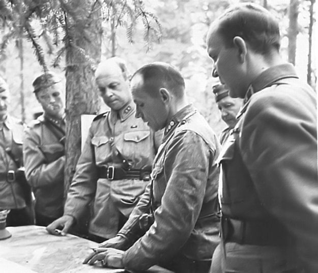 Ryhmä Talvelan Komentajat sotasuunnitelmia punomassa.